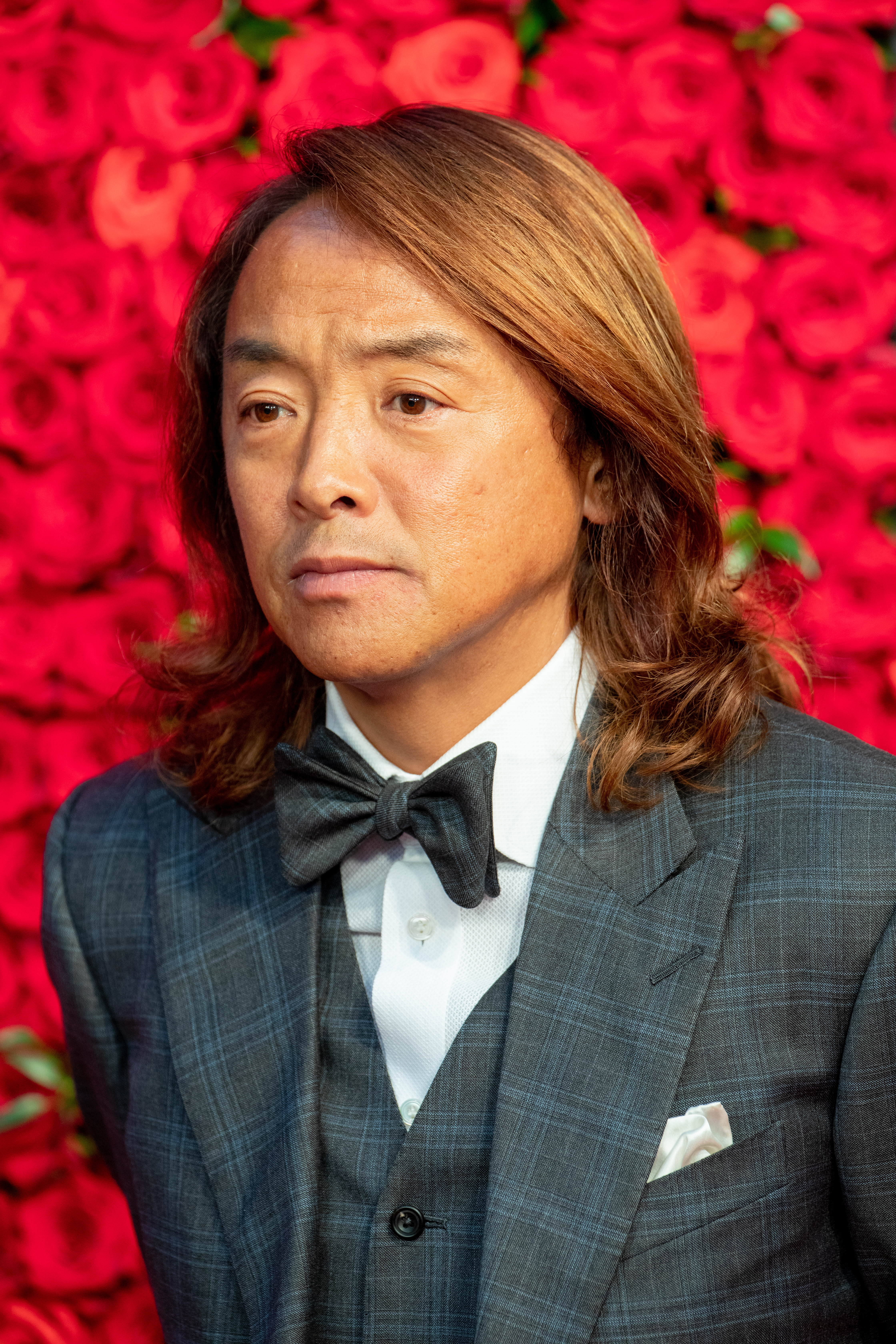 第30回 東京国際映画祭 オープニングセレモニー 北澤豪 (GOAL! GOAL! GOAL! -フットボール映画ベストセレクション-)